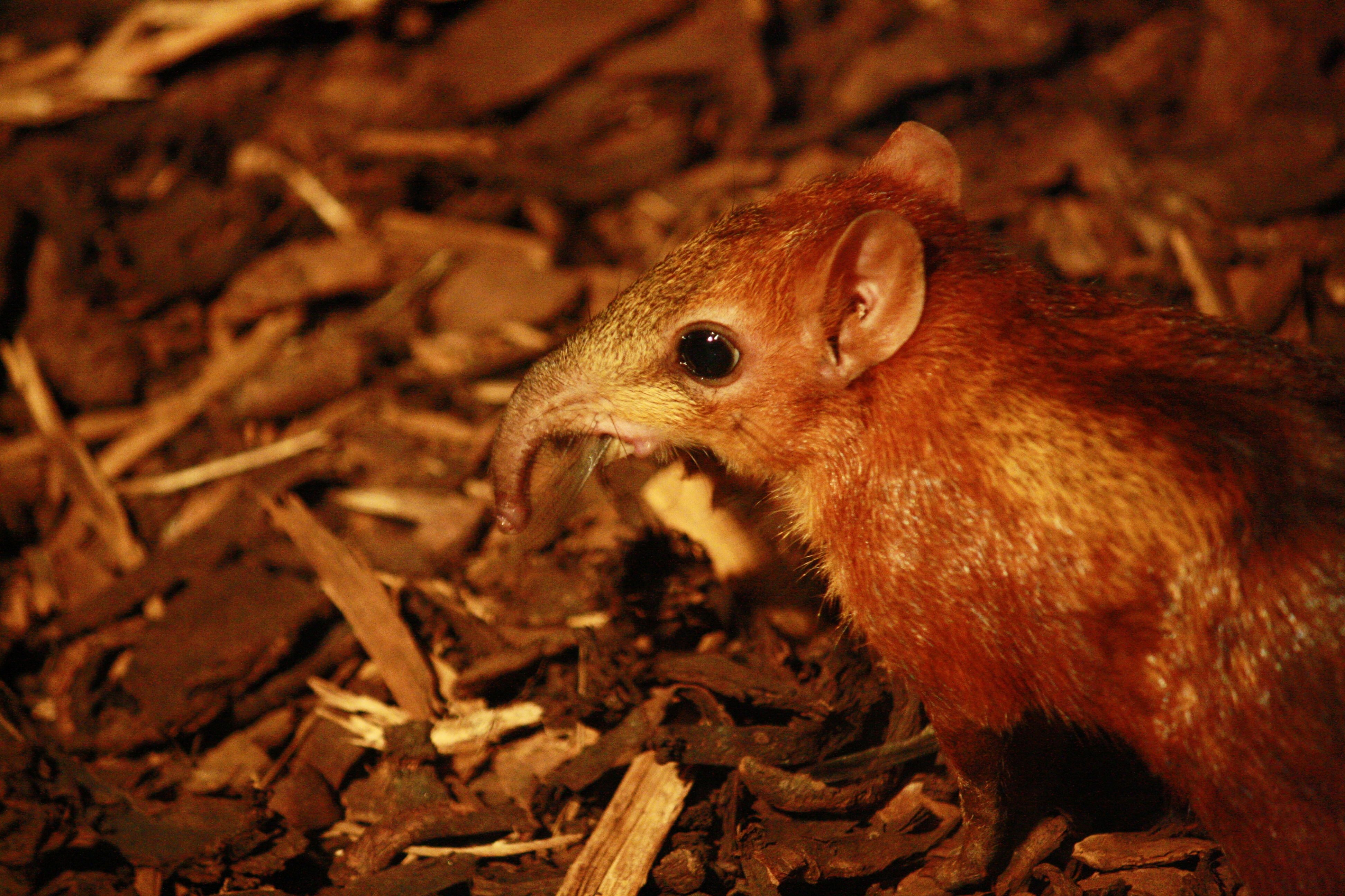 Zoo Praha